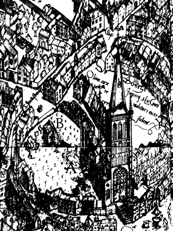 Burgplatz mit Salvatorkirche in Duisburg